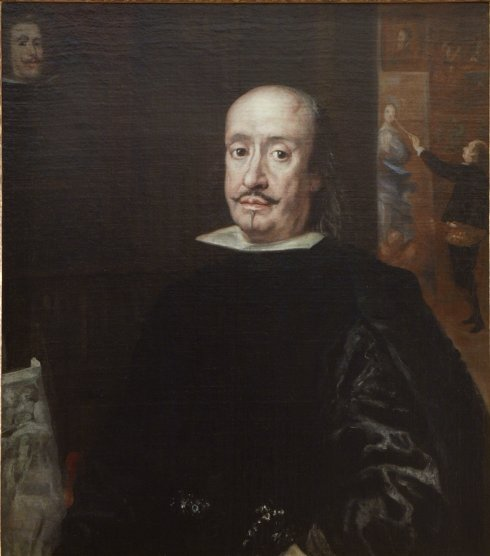 Retrato del pintor español Francisco Rizi (1614-1685). Este retrato fue atribuido en el pasado al pintor Juan Carreño de Miranda.